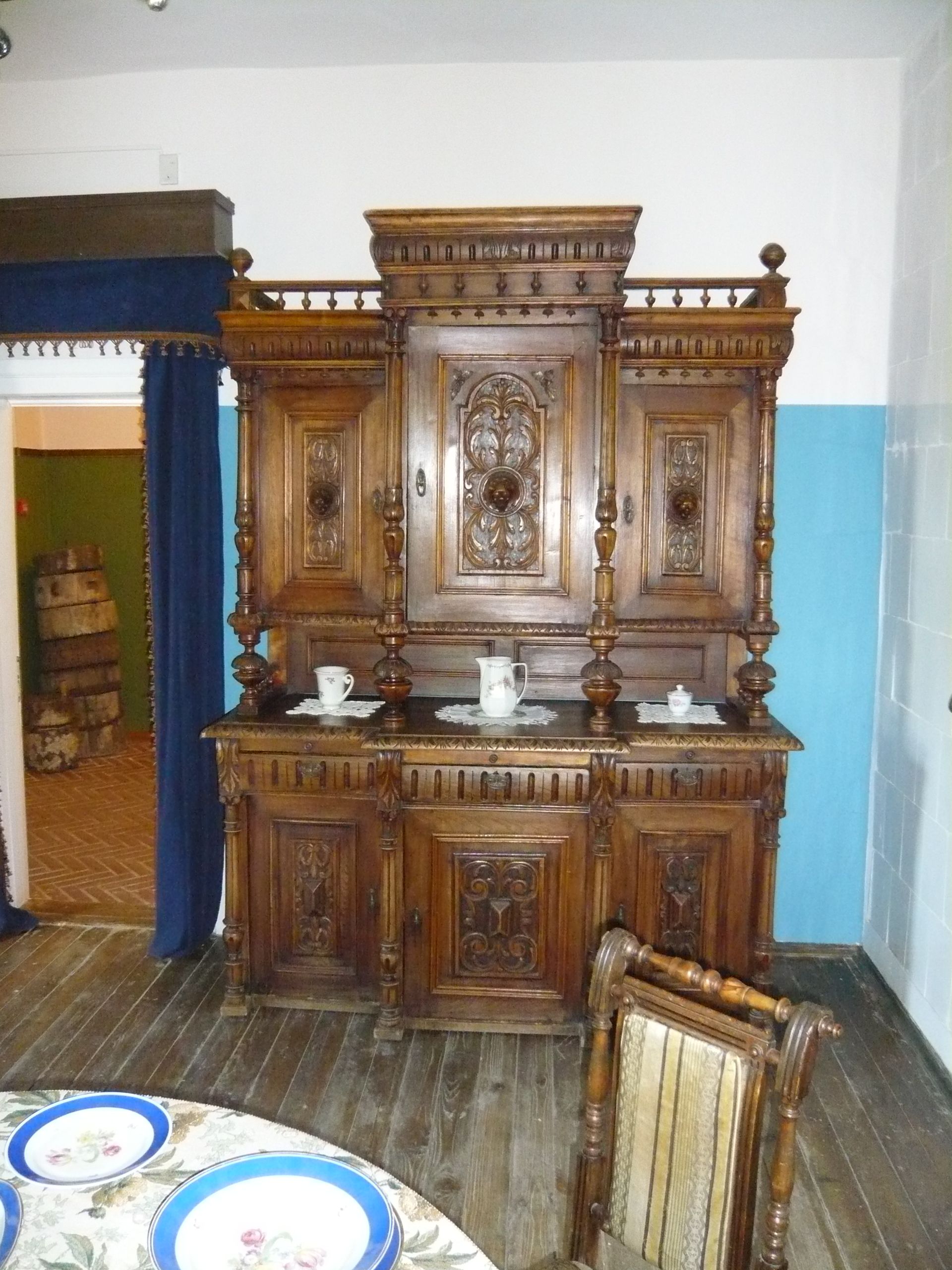 Экспозиция во флигеле музея в Лошицах. Минск. Май 2015 года.